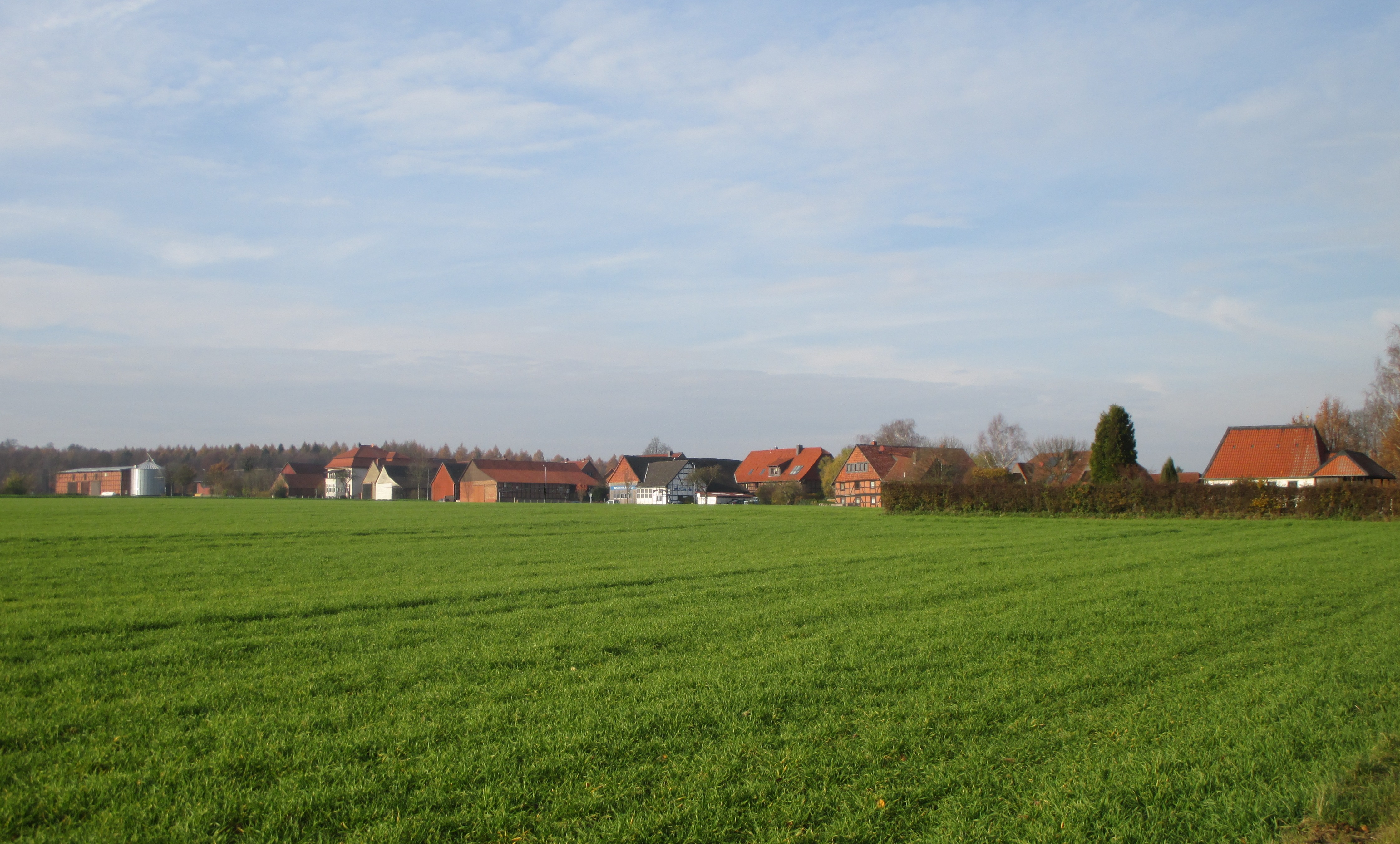 südwestlicher Ortsrand von Hohenassel, Gemeinde Burgdorf, Landkreis Wolfenbüttel